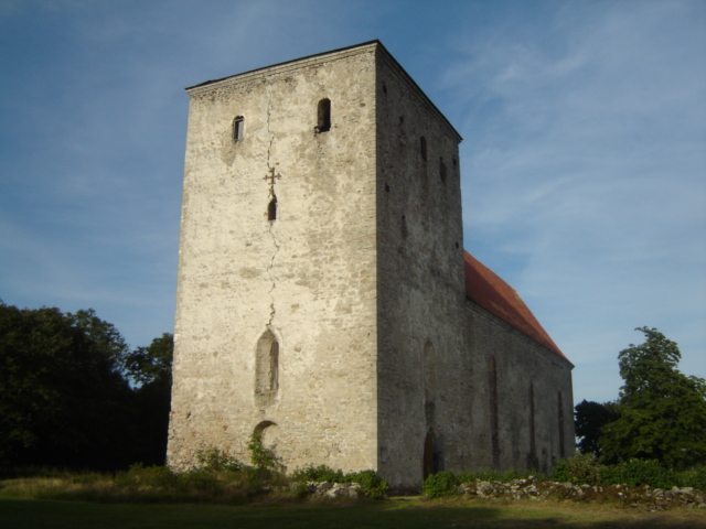 Pöide tornlinnus. Praegune Pöide kirik